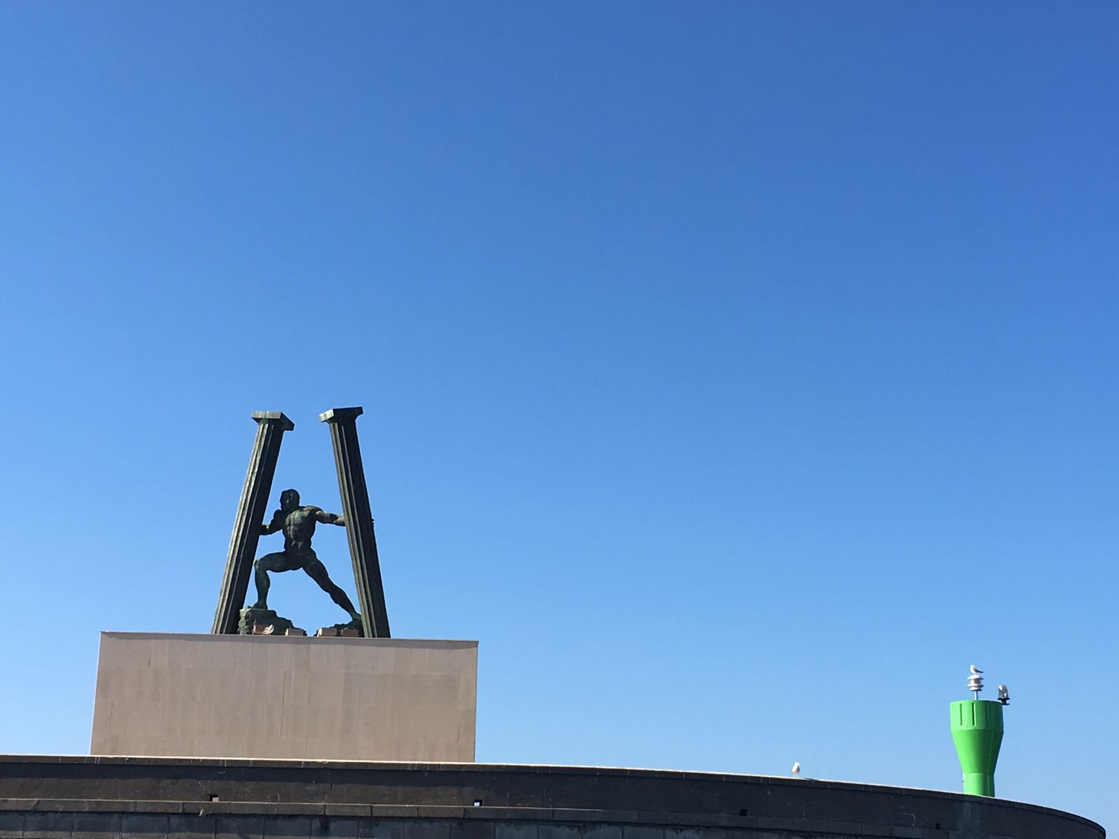 Según la mitología, Hércules separó Europa de África, haciendo este monumento en Ceuta para recordarlo.